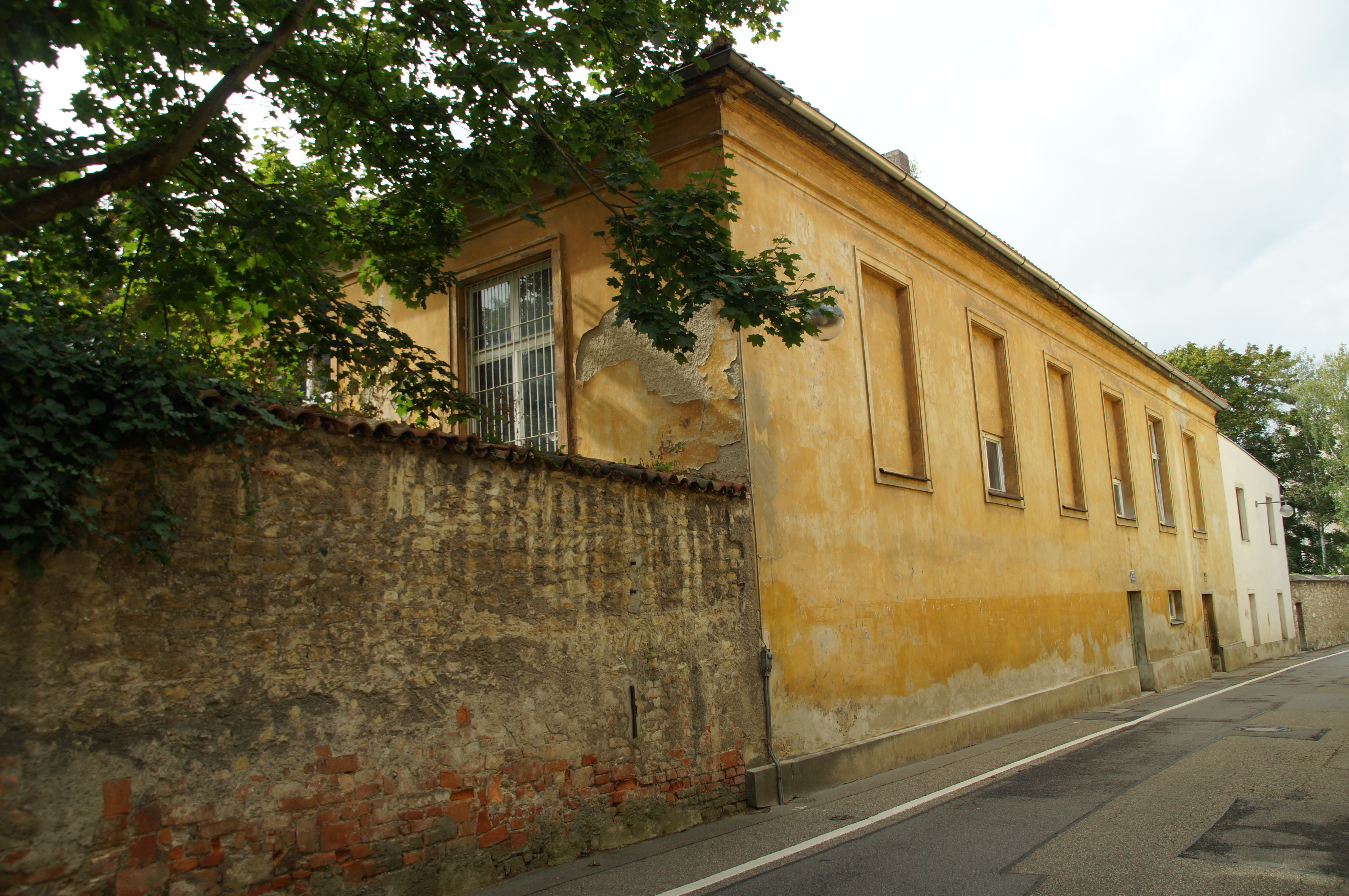 Stahlzwingerweg 15-17, Regensburg, ehem. Gesellschaftshaus und Schießstand der Armbrust-Schützengesellschaft Zum Großen StahlThis is a photograph of an architectural monument.